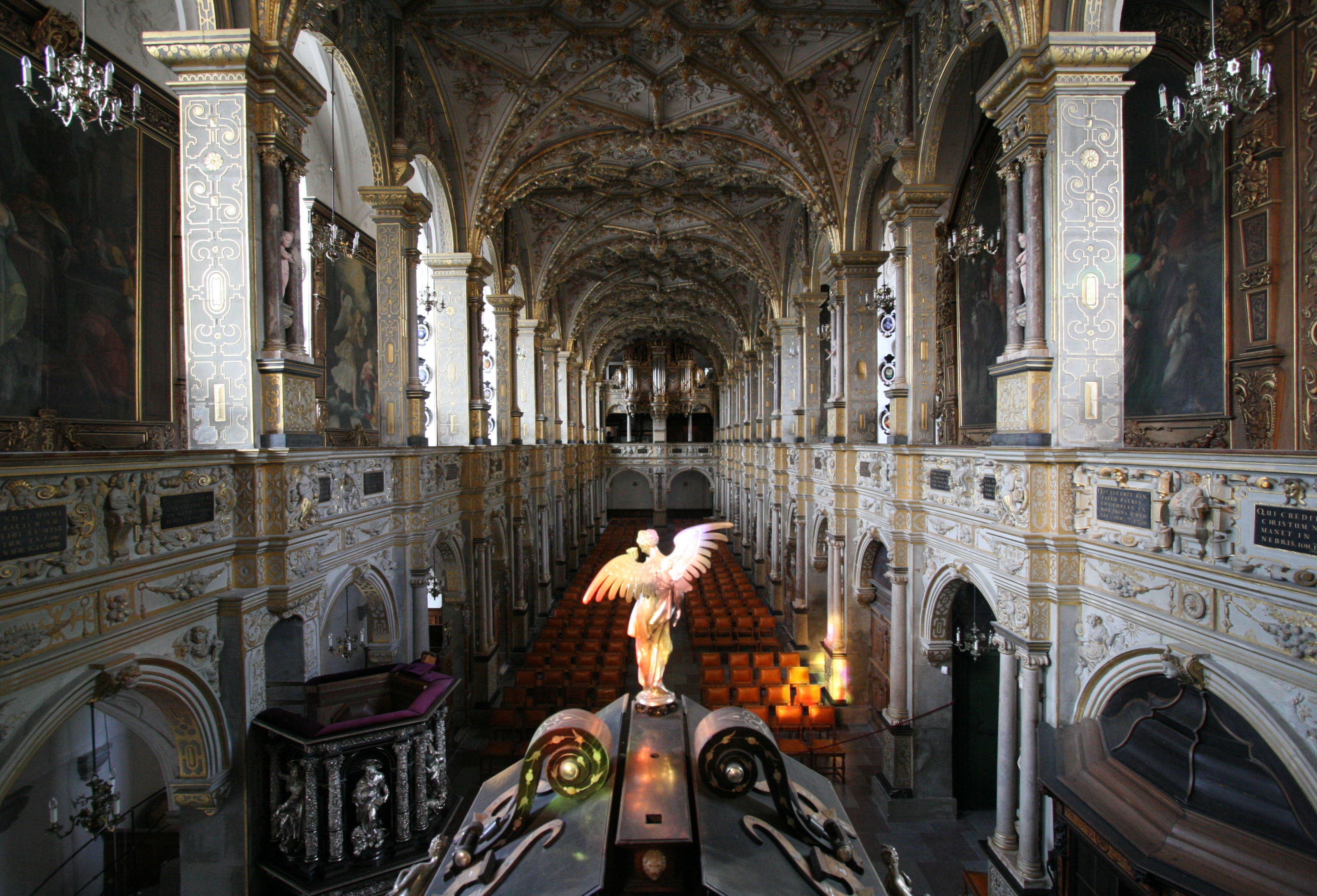 Frederiksborg Slotkirke, Hillerød, Denmark. Interior from the gallery behind the altar. Wide angle.